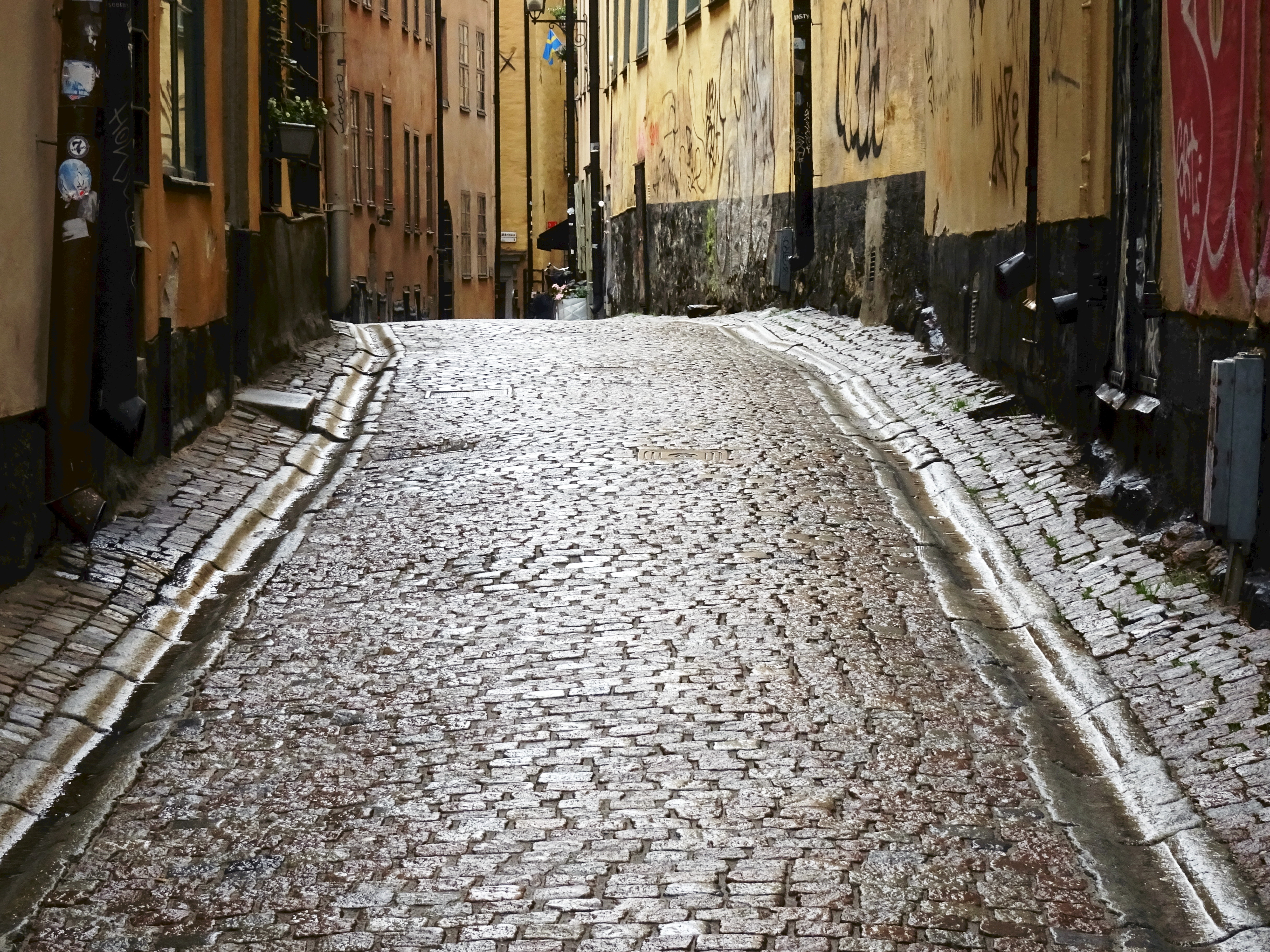 Prästgatans rännstenar